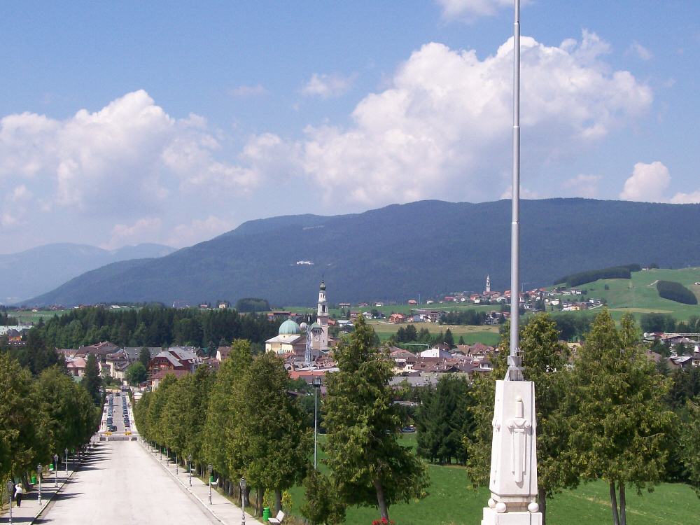 Veduta di Asiago dal Sacrario Militare